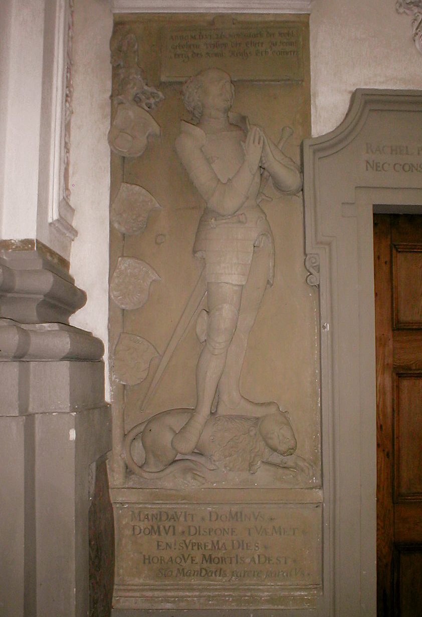 Epitaph für Philipp von Weinsberg im Kloster Schöntal (Jagst)